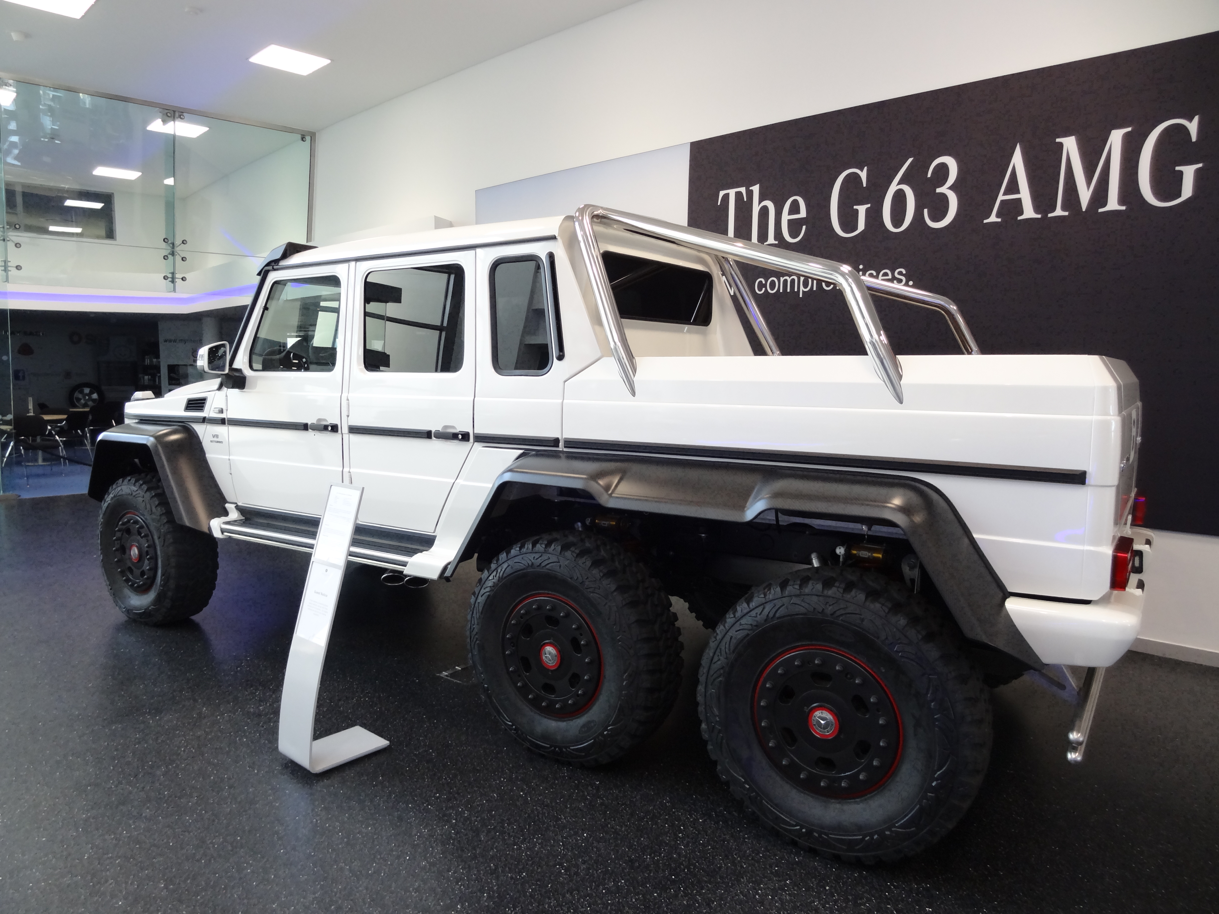 MERCEDES BENZ WORLD BROOKLANDS